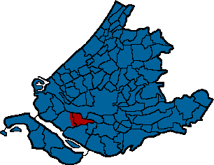 (Original text: Putten in Zuid-Holland)